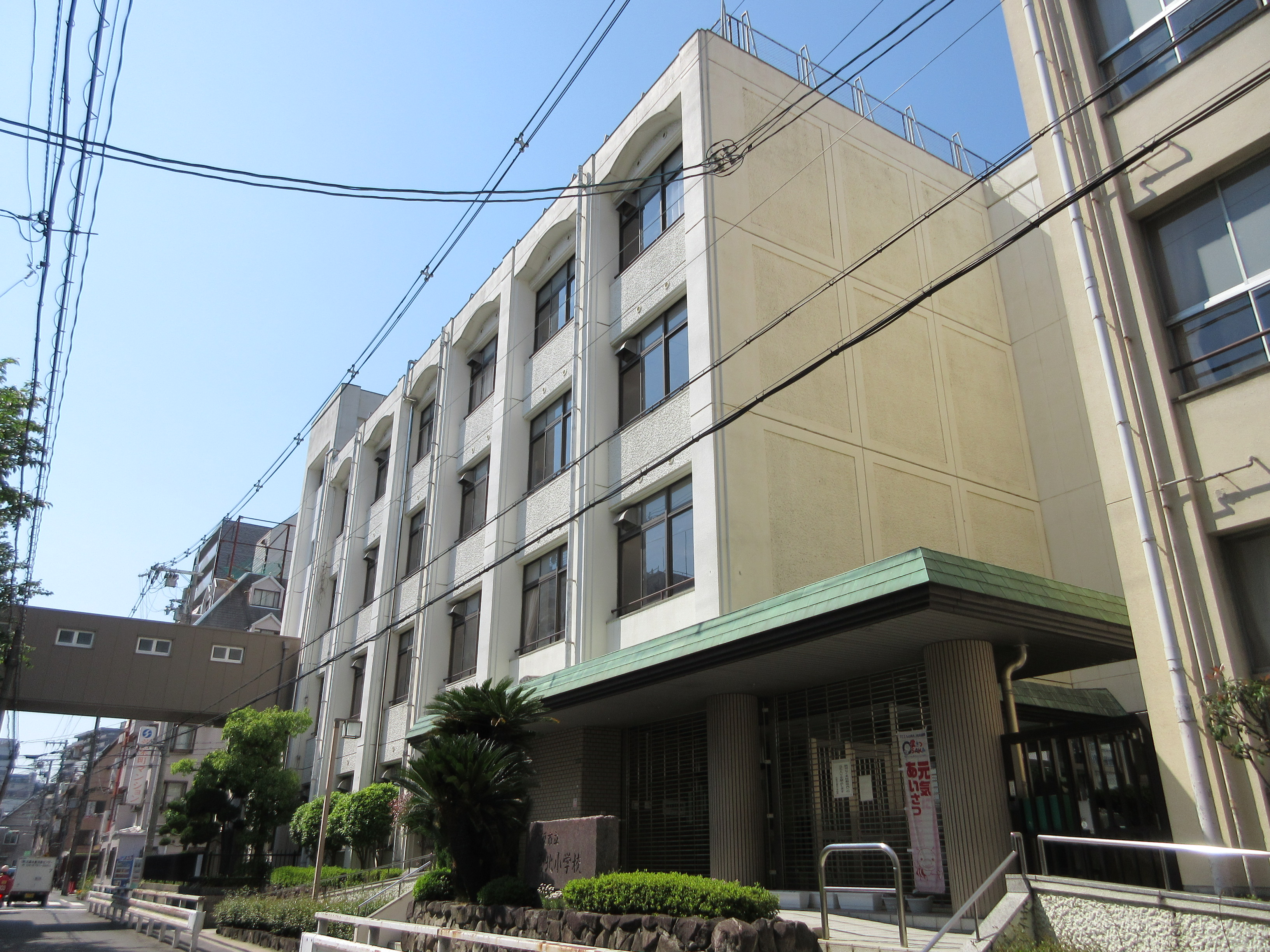 大阪市立菅北小学校